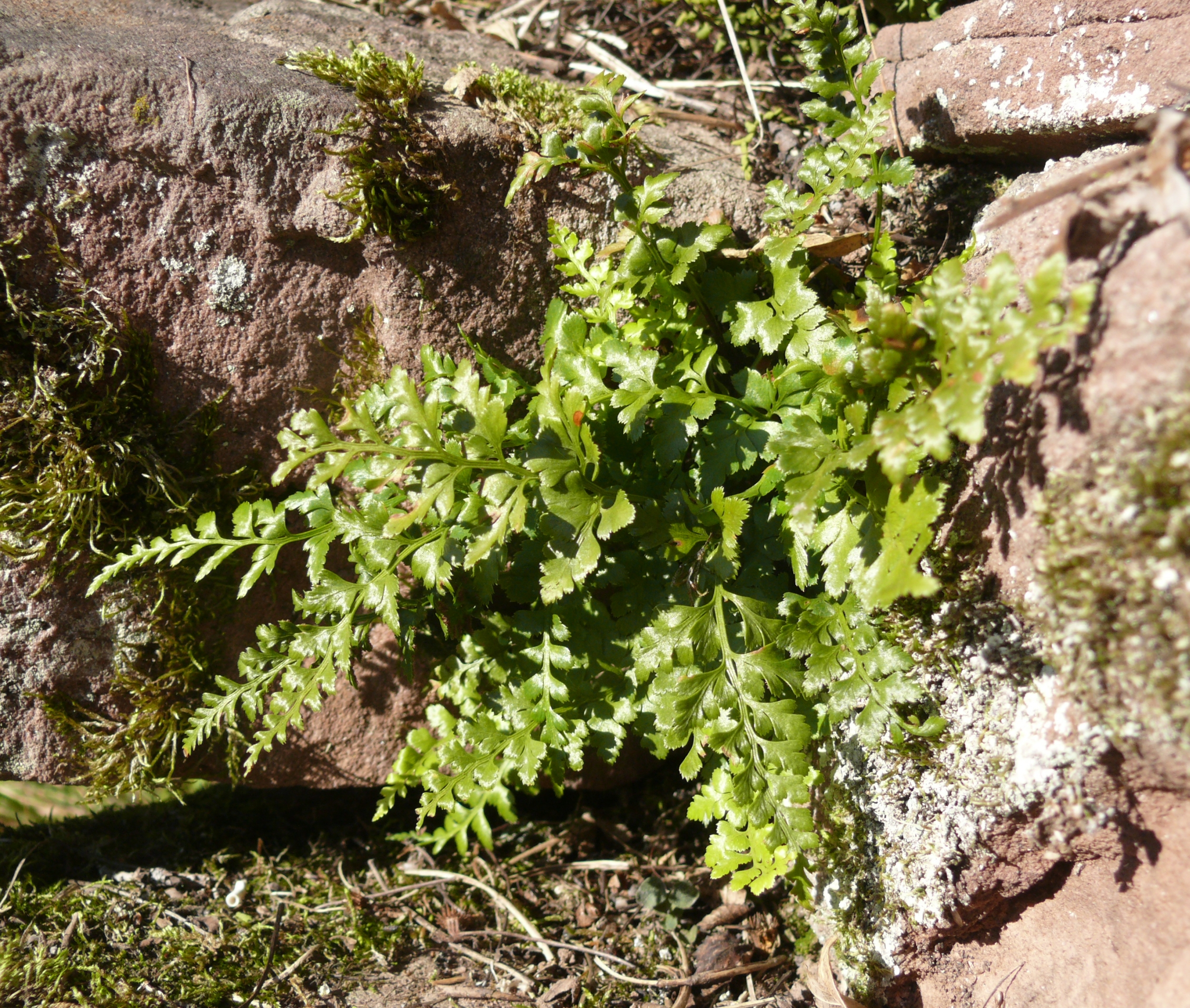 Asplenium adiantum-nigrum, Spessart, Germany